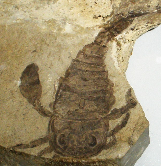 Fossil of Eurypterus, an extinct sea scorpion- Took the photo at De Groene Poort, Boxtel